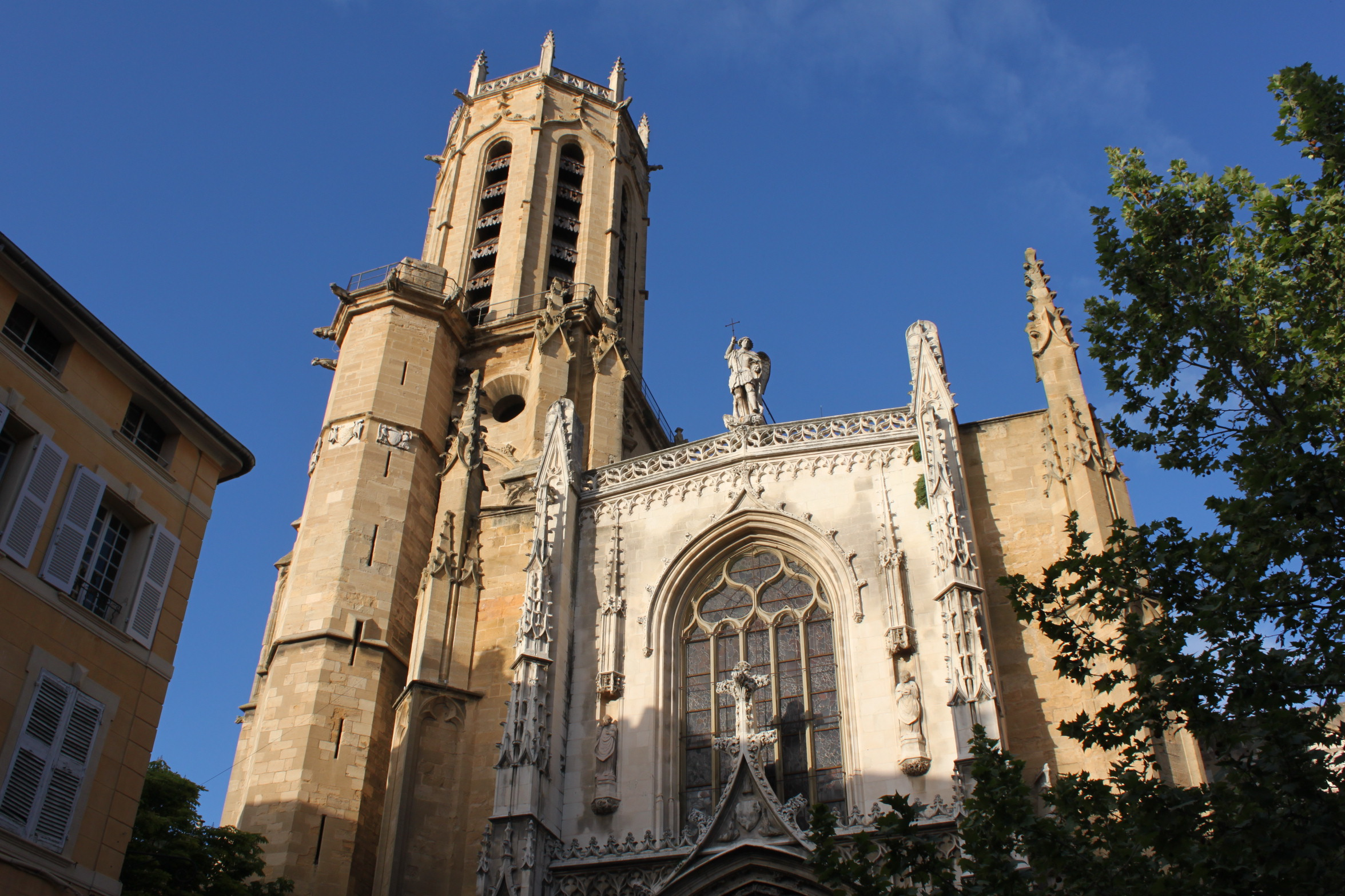 Aix en Provence